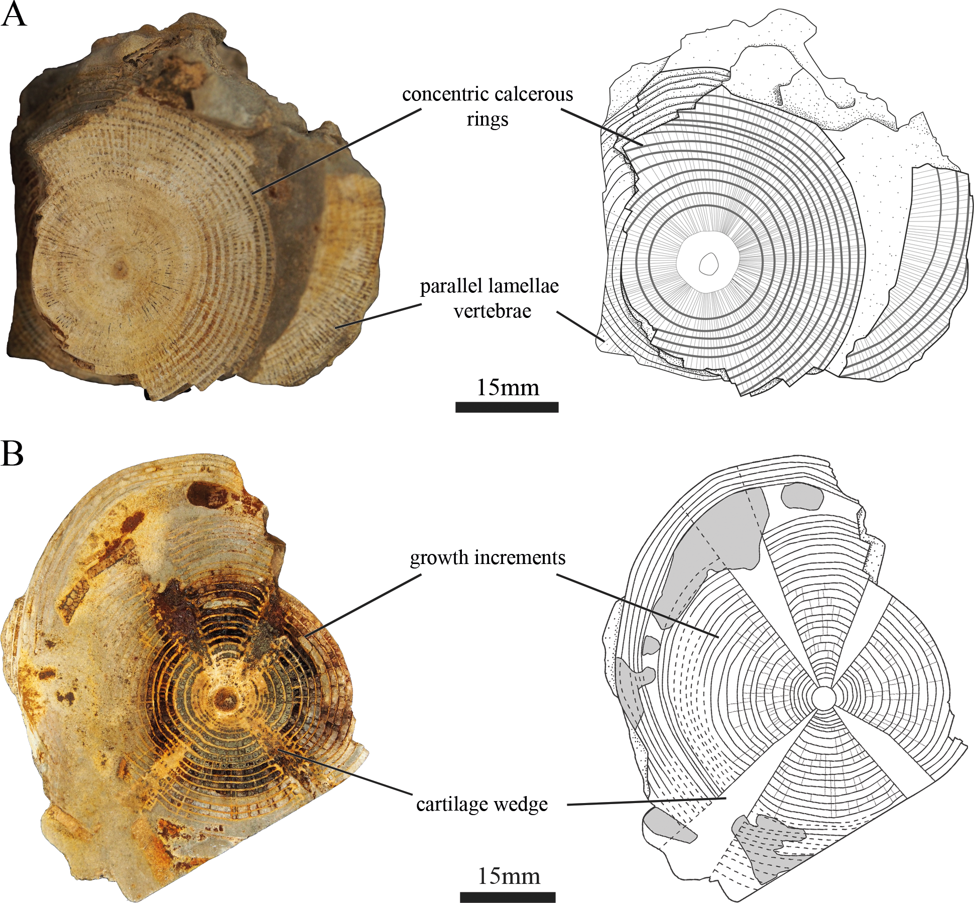 Fig. 3. Patrón de calcificación de los centros vertebrales de EMRG-Chond-SK-1. (A) vista de cerca e ilustración del centro vertebral EMRG-Chond-SK-1a. La superficie articular está desgastada y expone la capa interna de las vértebras, mostrando anillos calcáreos concéntricos y bandas paralelas que corren perpendiculares a ellas; (B) la sección vertebral en el plano transversal y la ilustración de EMRG-Chond-SK-1b muestran un patrón de calcificación asterospondílica con cuatro cuñas de cartílago que se irradian en diagonal desde el centro hasta la base de los arcos neural y hemal.